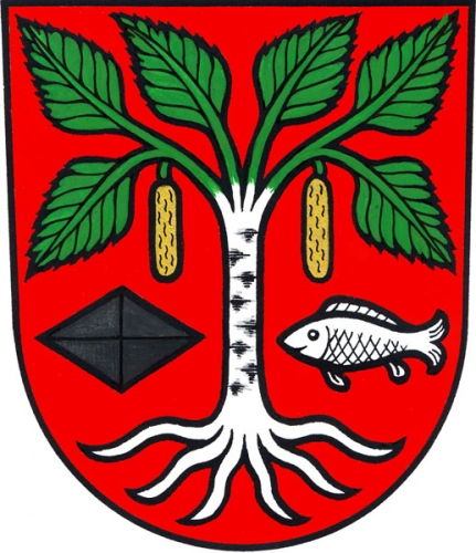 znak, Podbřezí, okres Rychnov nad Kněžnou